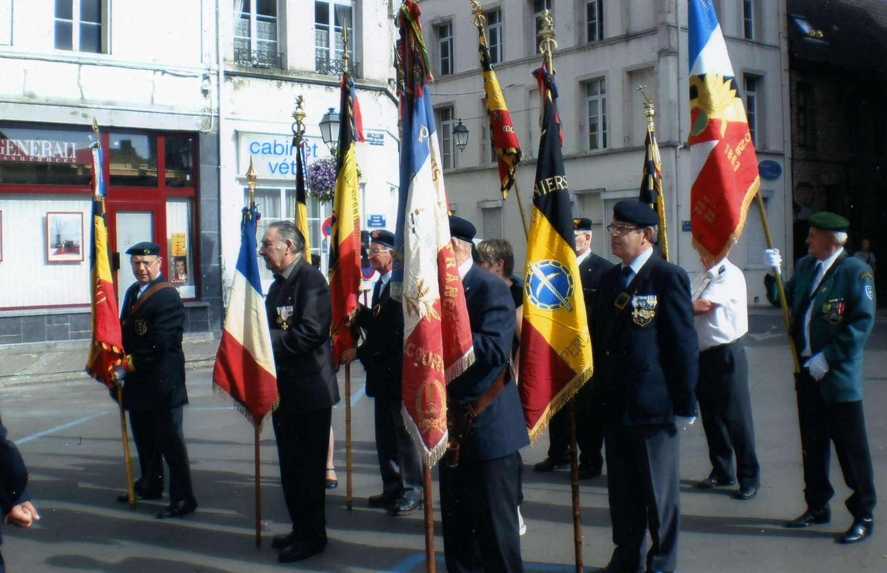 Intervento a Lille A.I.C.I.